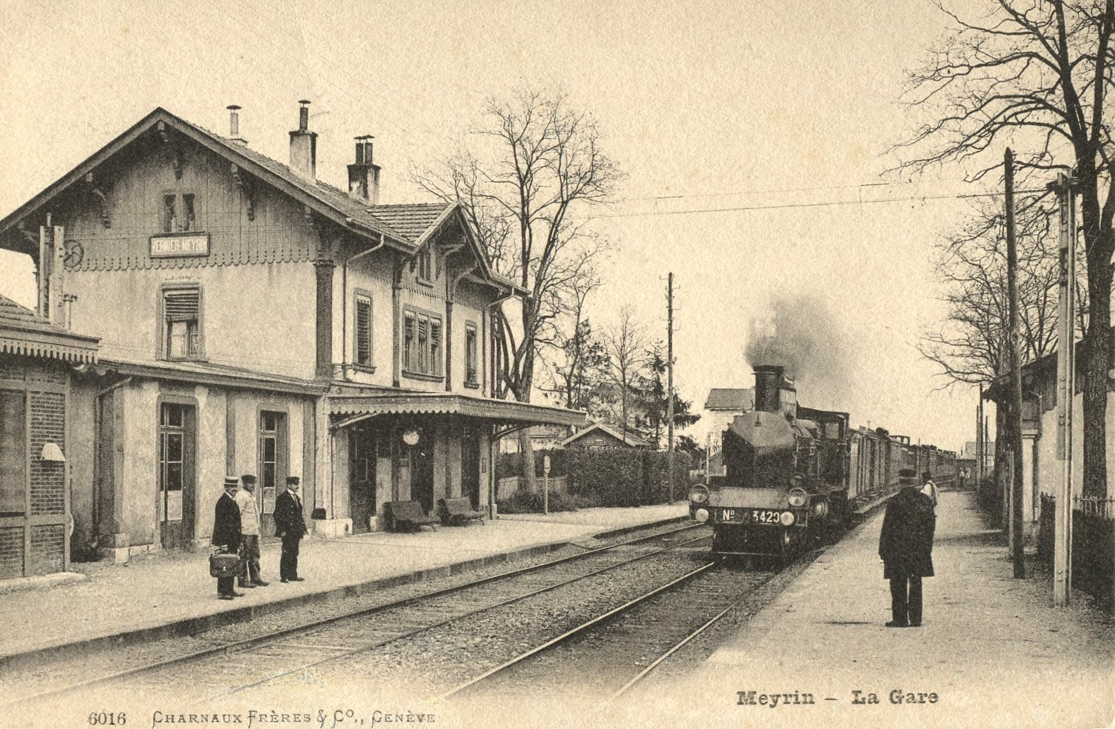 Carte postale de la gare de Vernier-Meyrin